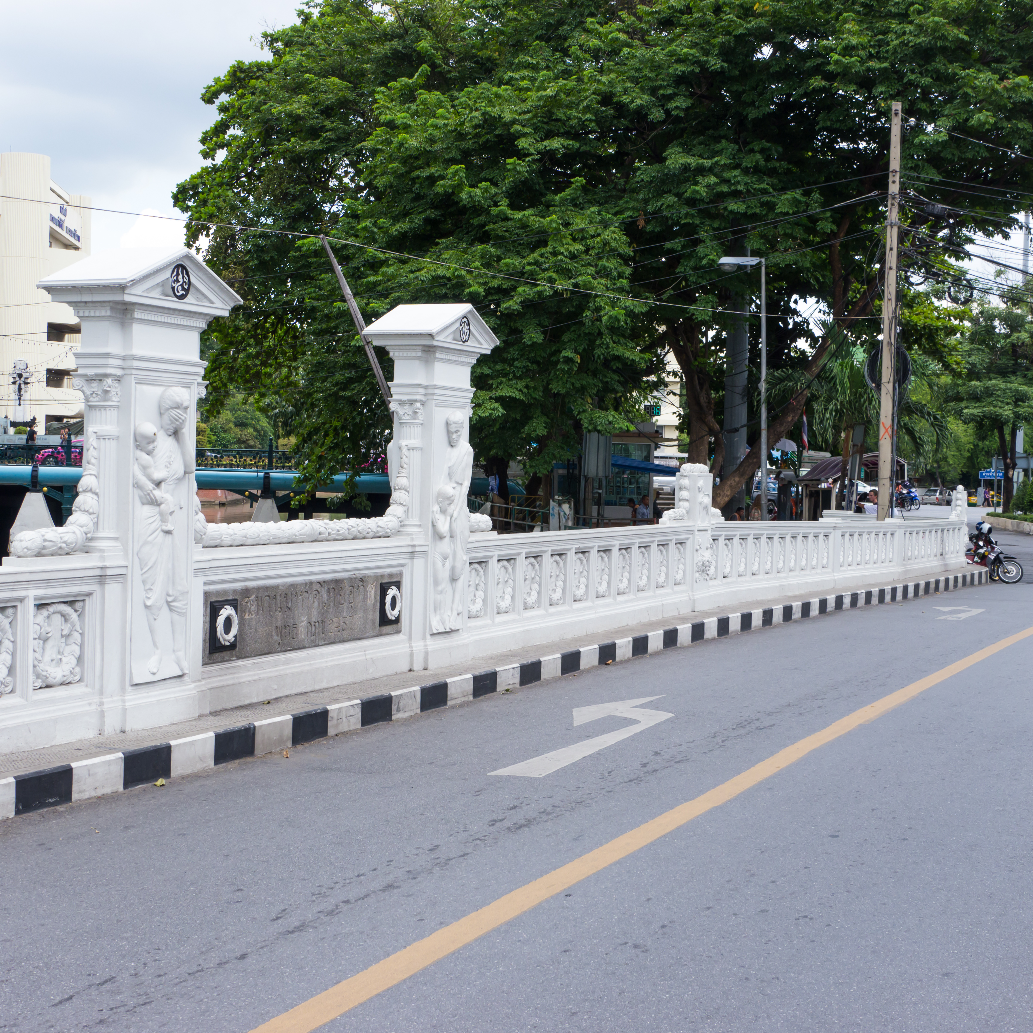 สะพานมหาดไทยอุทิศ